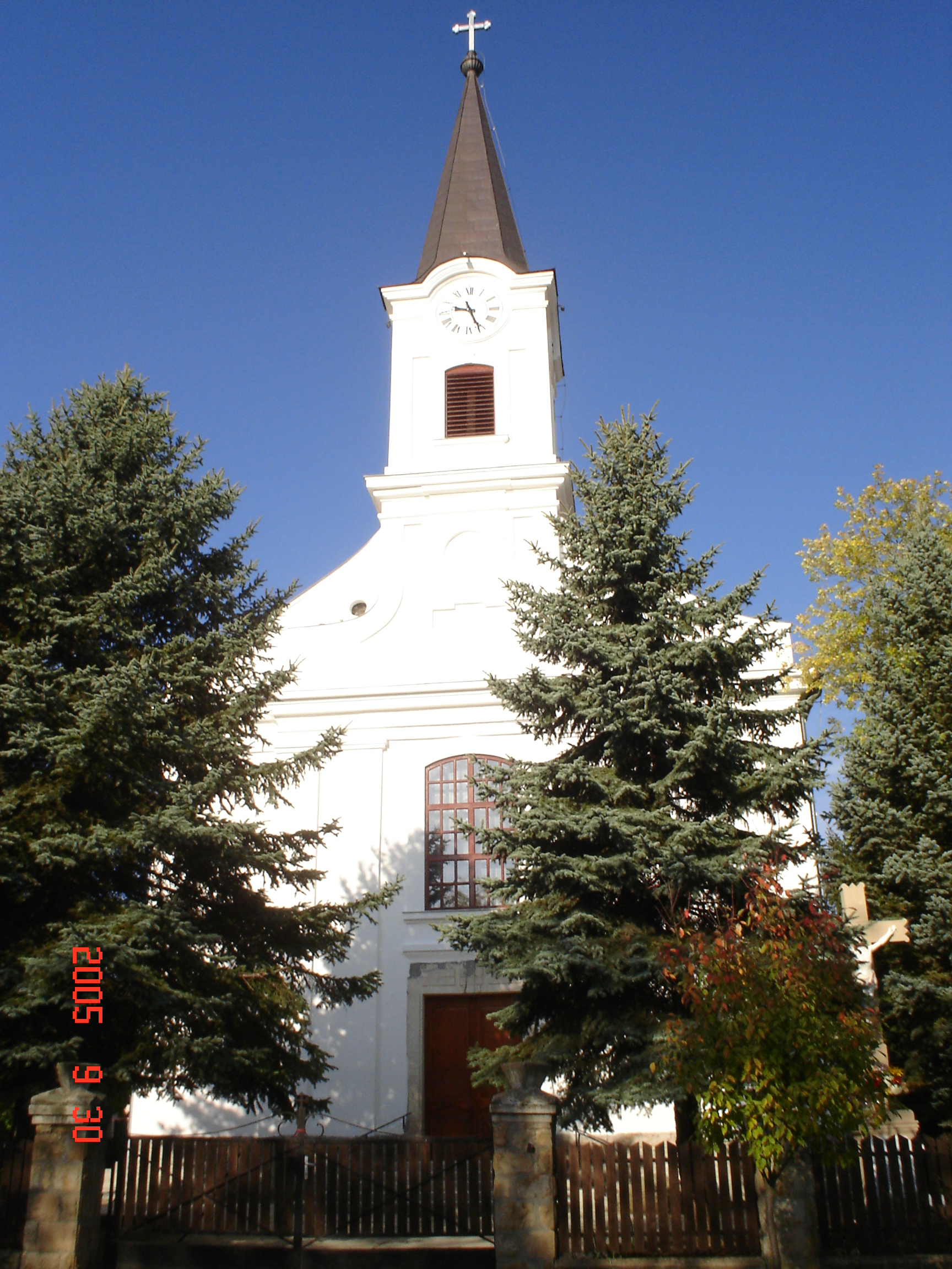 Dejtár római katolikus temploma